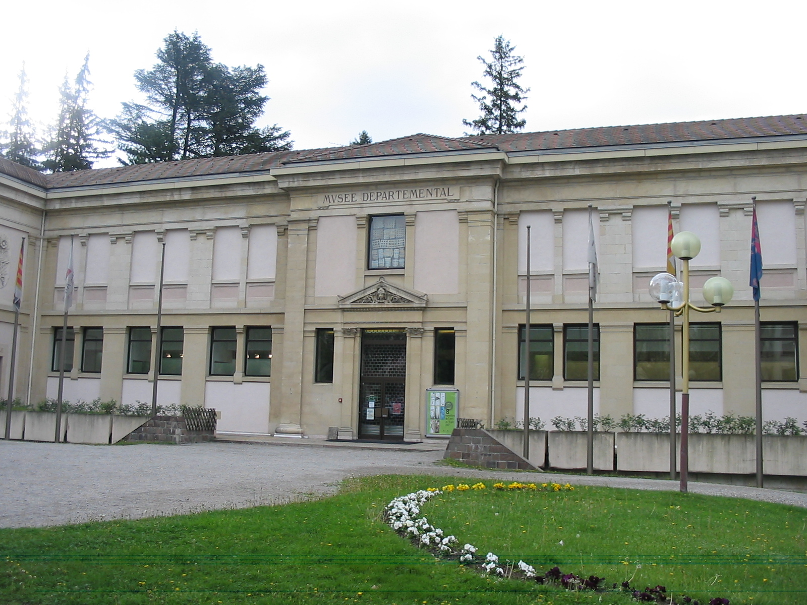 Musée départemental de Gap (05).